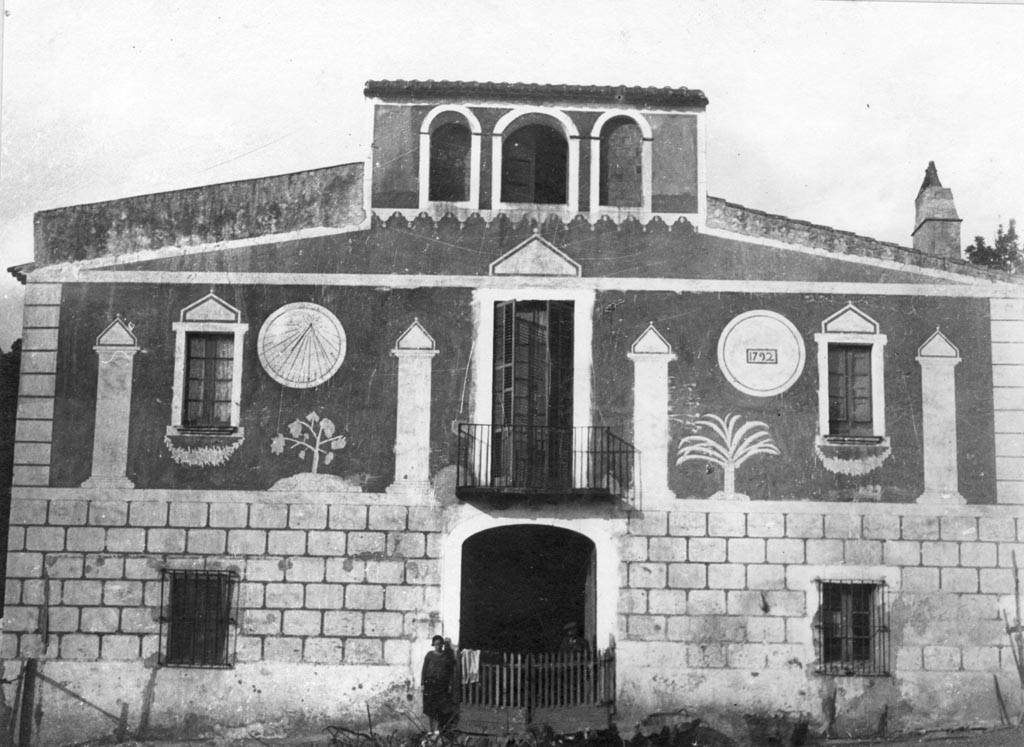 Façana esgrafiada i amb rellotge de sol de Can Roca de Dalt. Jordi Audet i Viñals (1926-12)